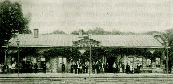 Вокзал станції Хацапетівка // ~1911—1912 (зараз станція Вуглегірськ)